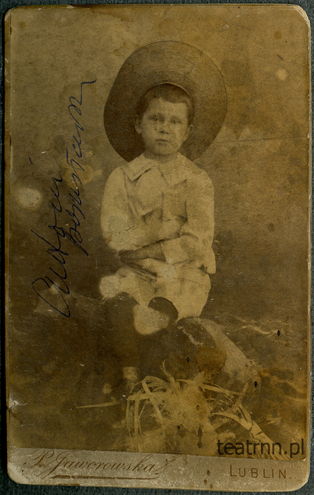 Antoni Bogusławski, jako dziecko; ok. 1900.